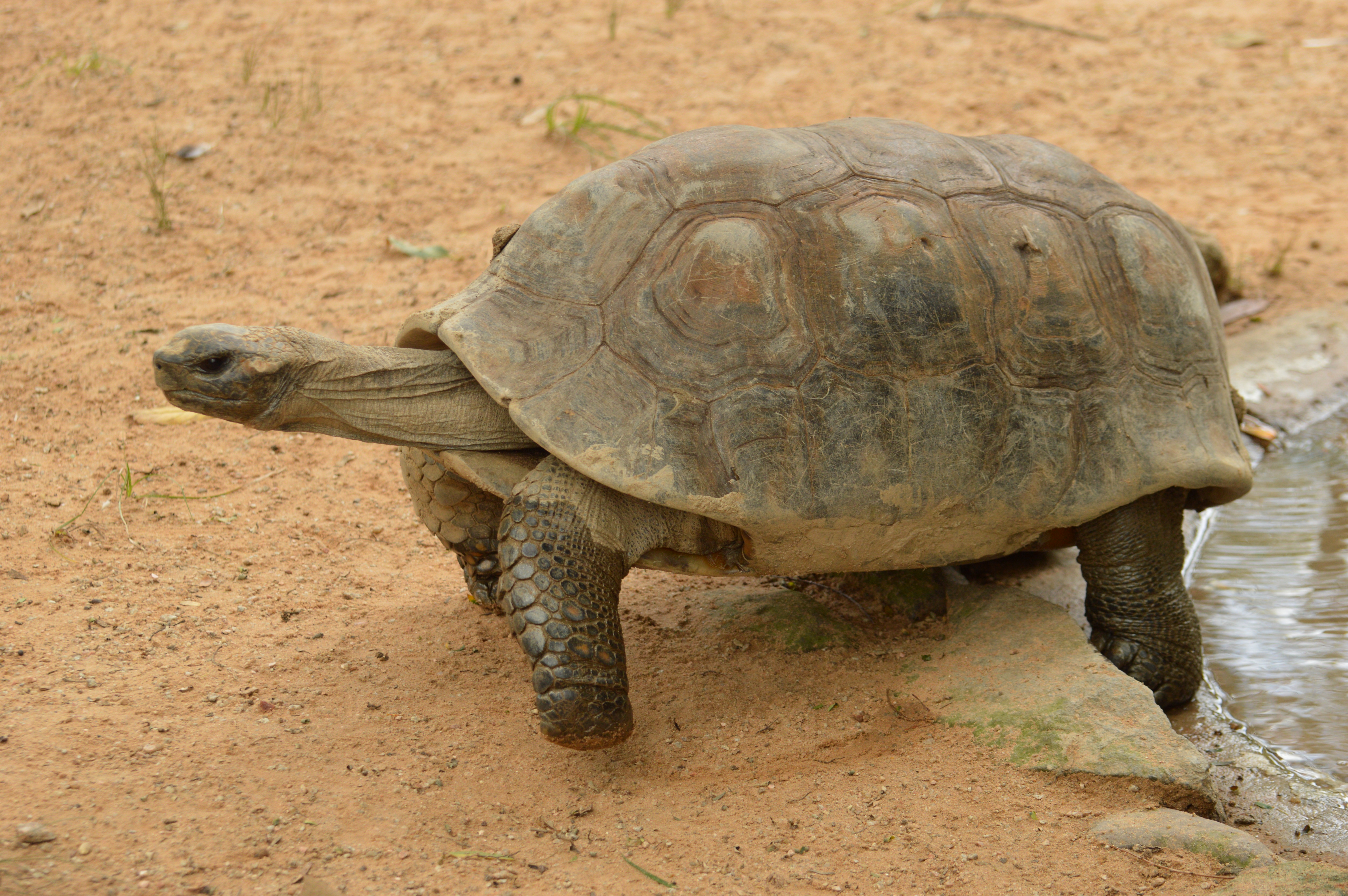 Jabuti-tinga (Chelonoidis denticulata) no Parque Zoológico de Sapucaia do Sul